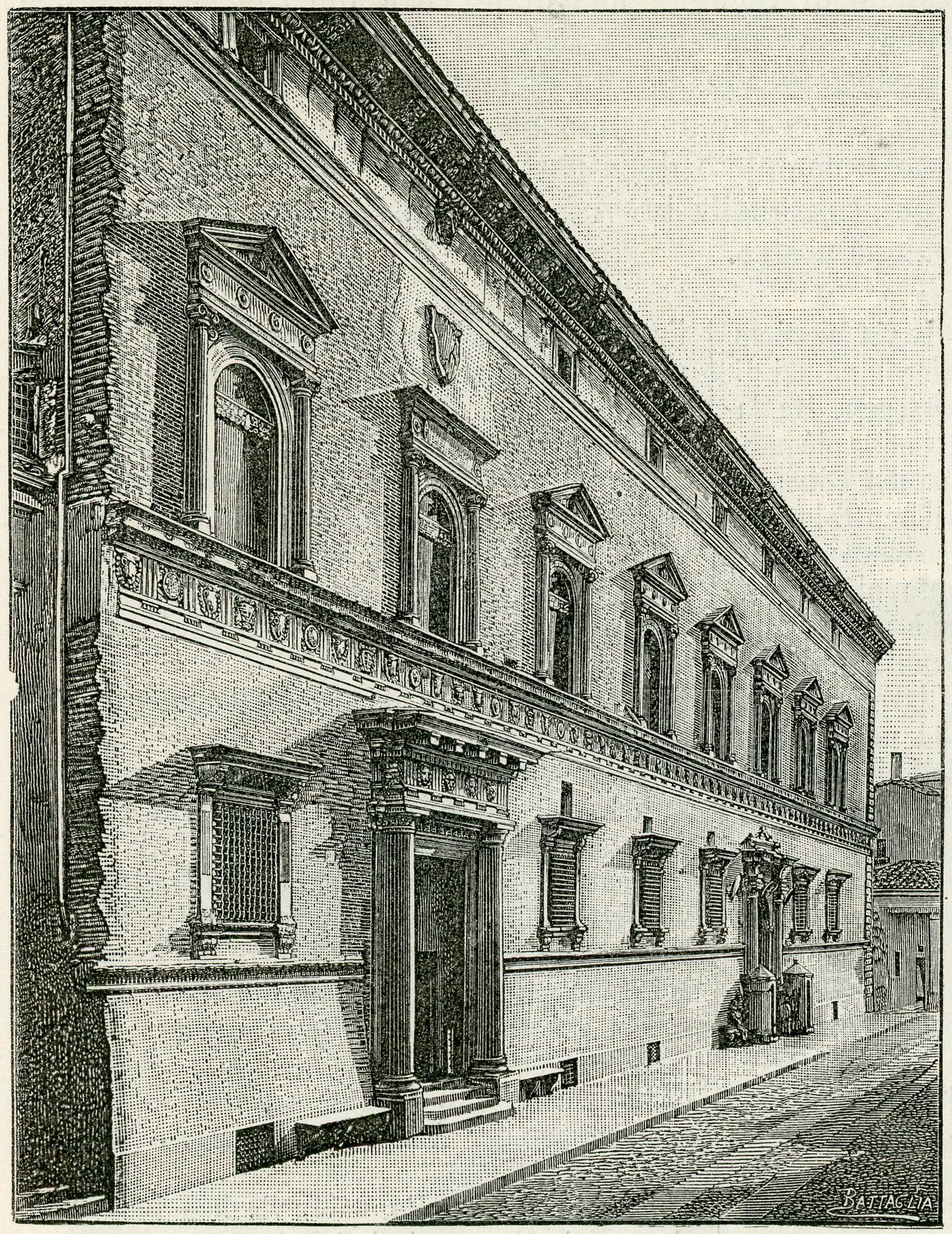 Bologna: Palazzo Albergati (xilografia di Battaglia).